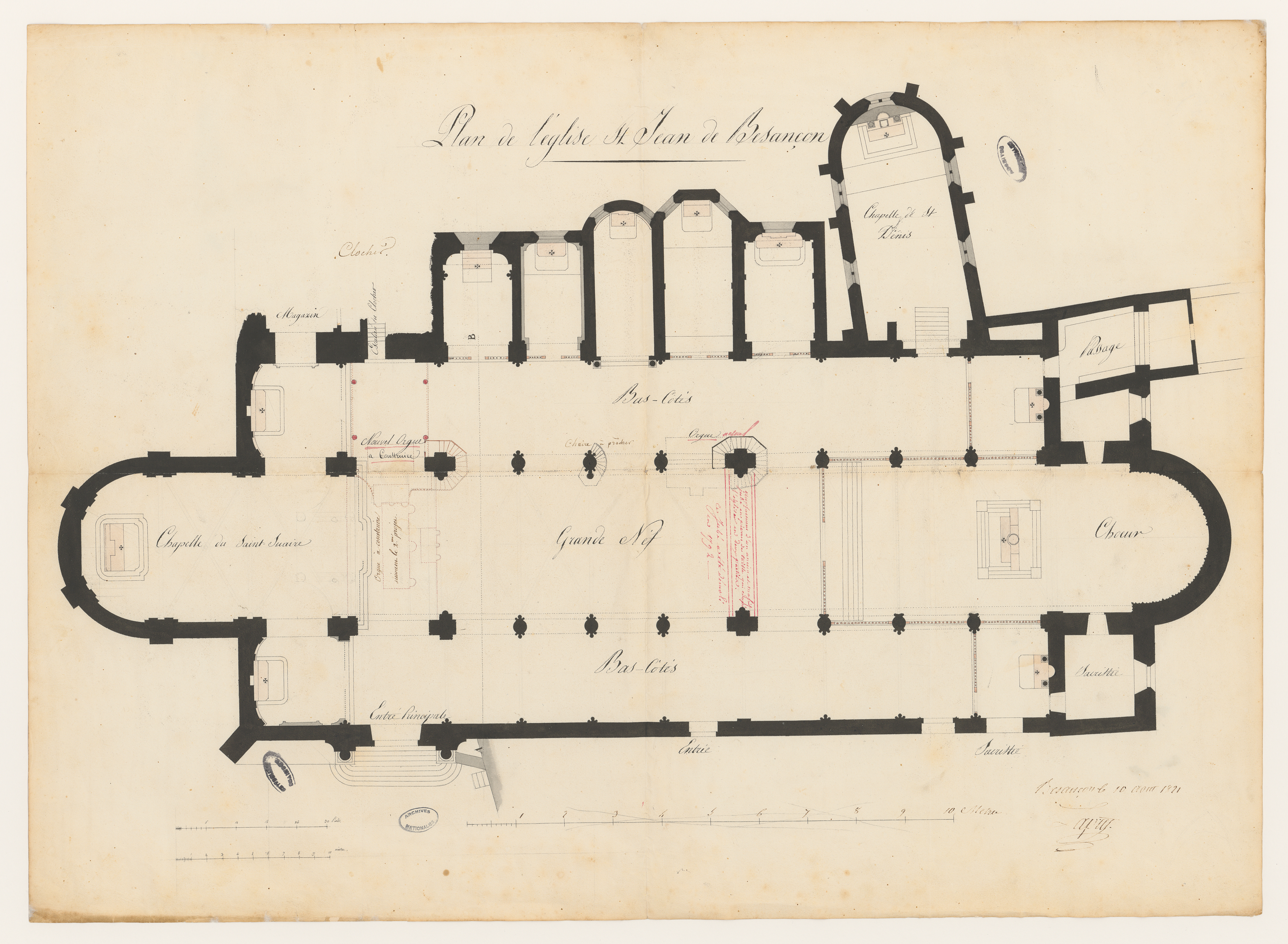 Plan de l'église S[ain]t-Jean de Besançon. Plan issu des dossiers de travaux de restauration des cathédrales (1802-1912), conservés aux Archives nationales (inventaire et autres documents numérisés consultables en ligne).